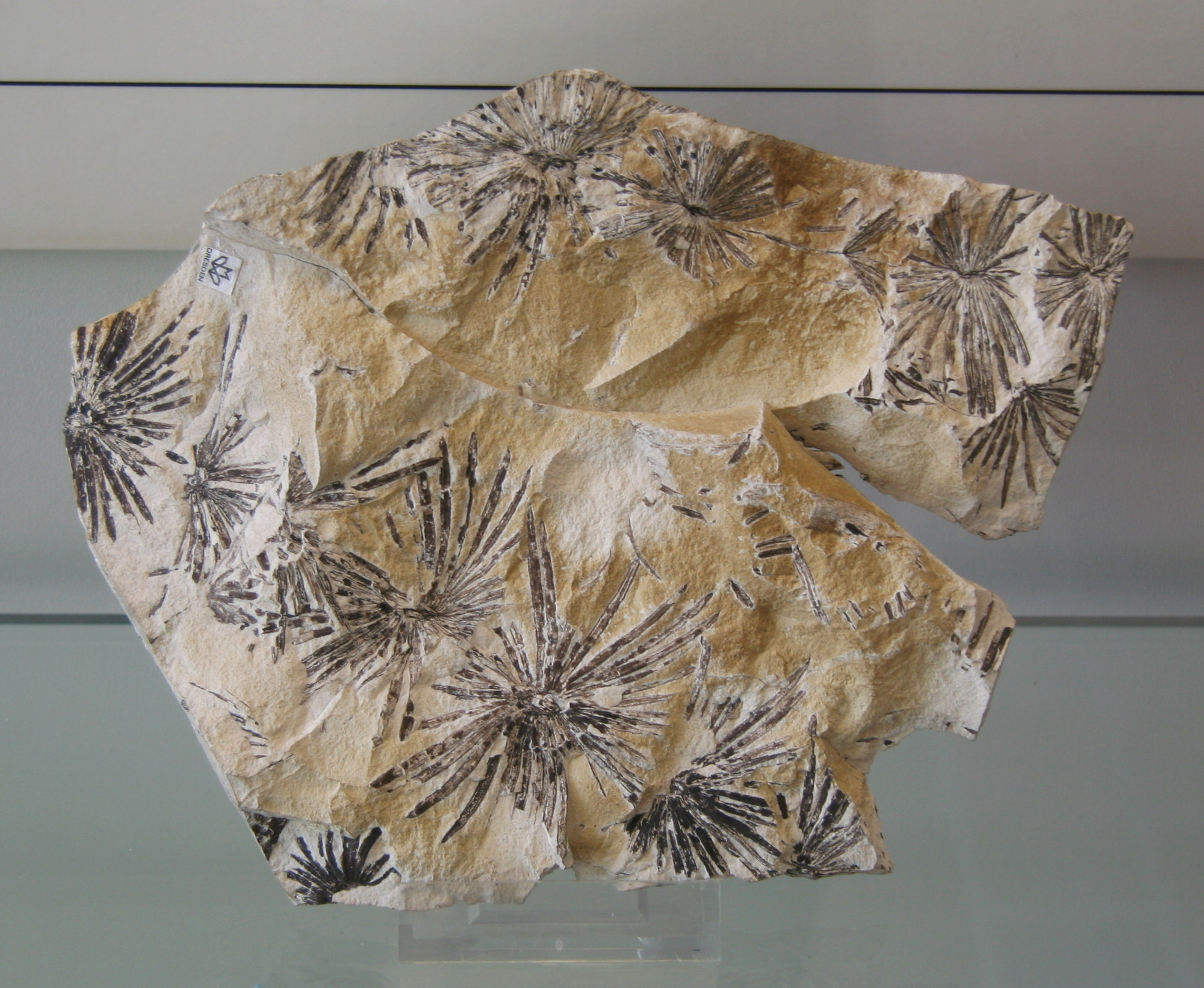 Pflanzenfossil von Annularia stellata im Botanischen Garten Dresden